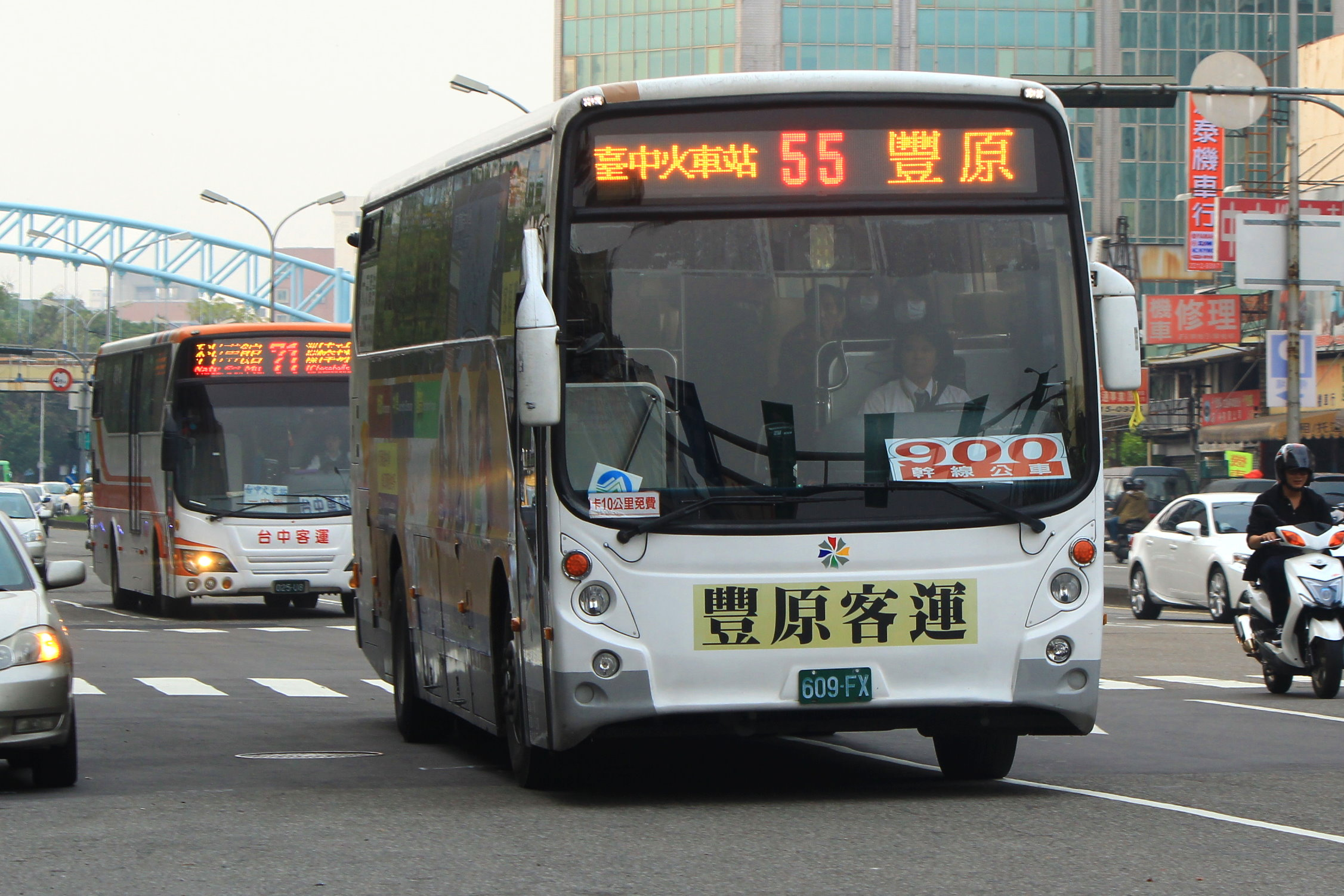 豐原客運日野RK8JRSA大客車609-FX（前）與台中客運日野RK8JRVA-KJF大客車025-U8（後）。